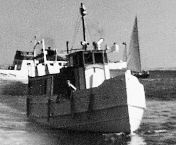 M/S Sotefjorden (f.d. S:t Erik) går in mot Smögenbryggan.